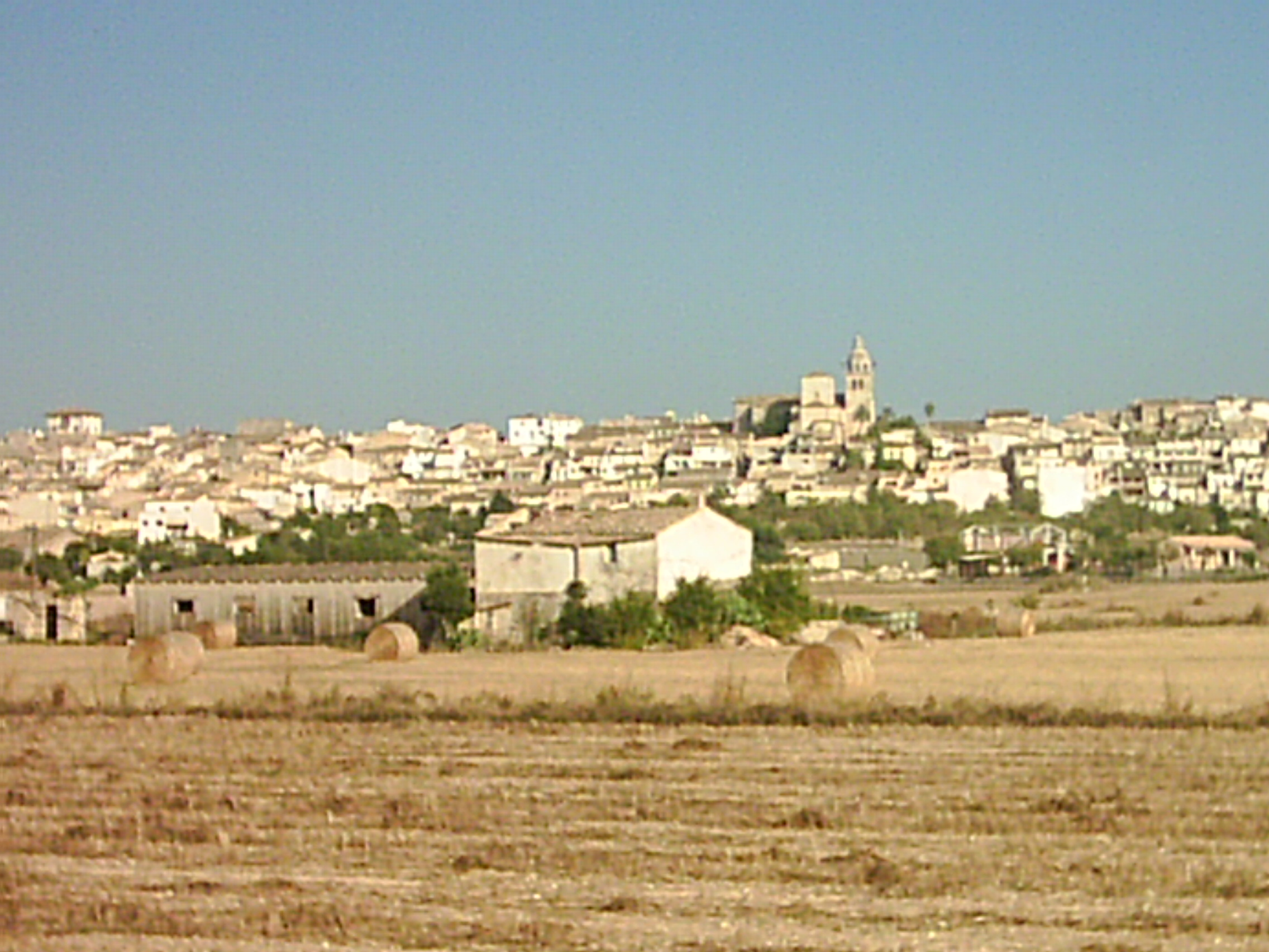 Montuïri des de la vessant nord